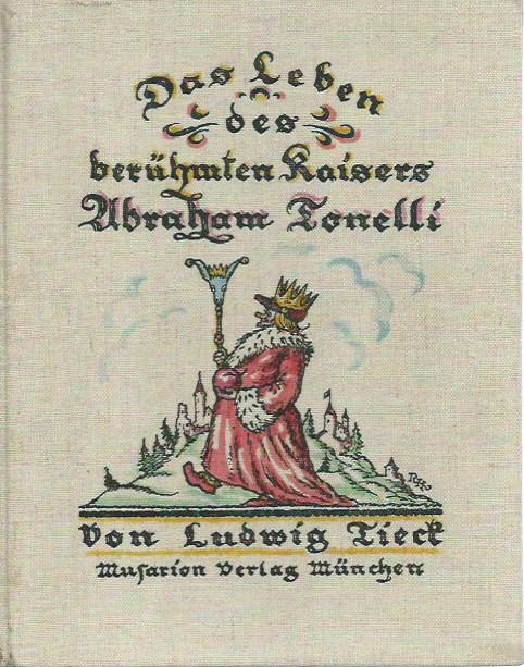 Ludwig Tieck: Das Leben des berühmten Kaisers Abraham Tonelli, Umschlag und 18 bunte Bilder von Rolf Hoerschelmann, München: Musarion Verlag, 1920